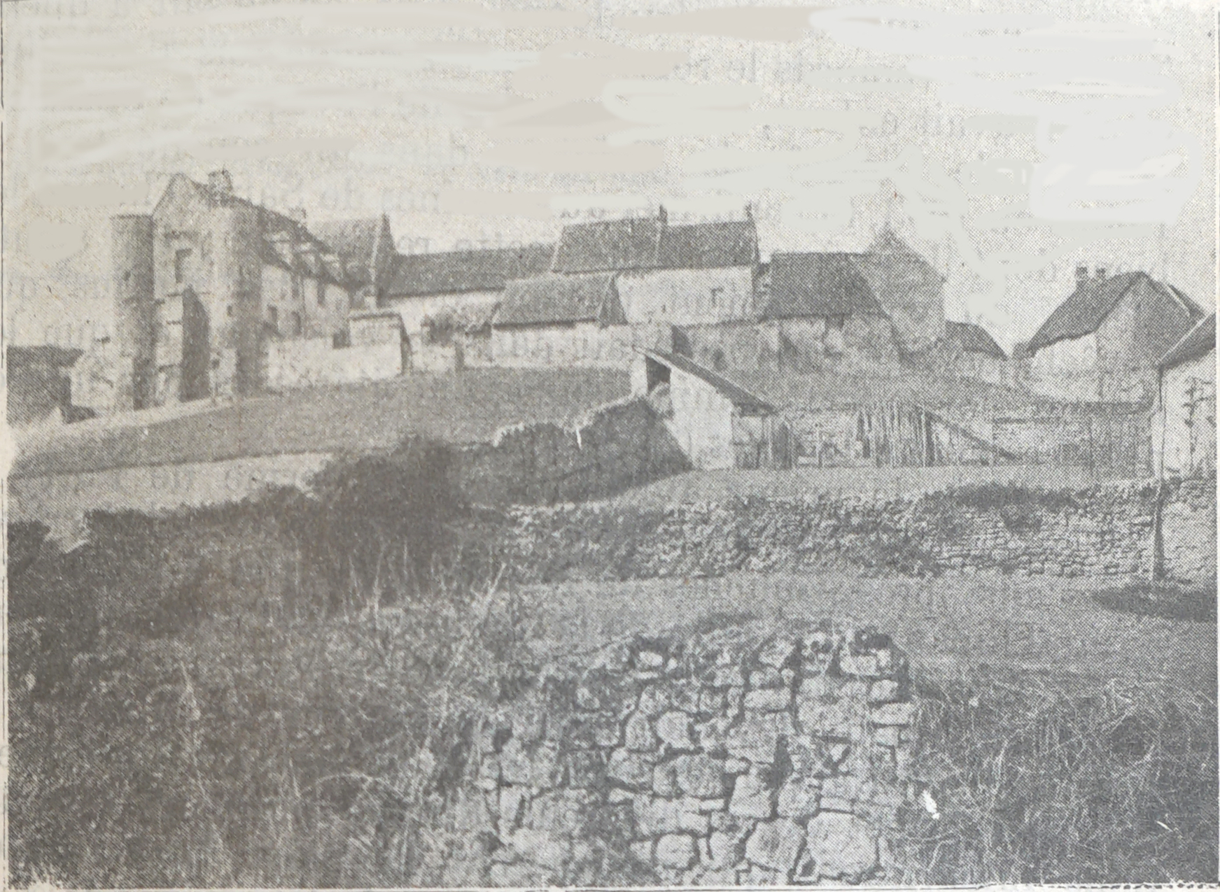 in "almanach Matot-Braine 1915-17".